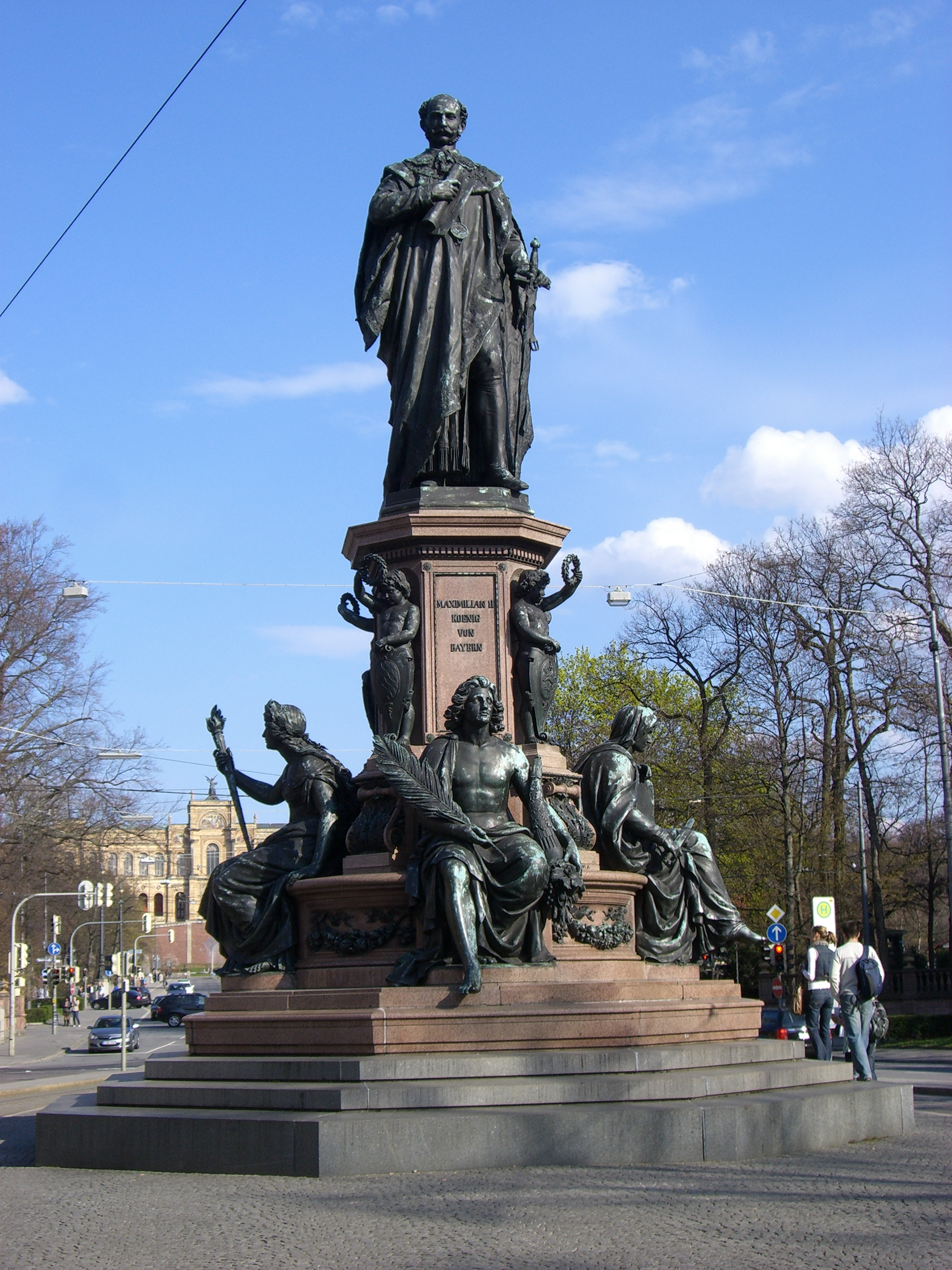 Überlebensgroße Bronzestatuen mit allegorischen sitzenden Figuren am Sockel und Inschrift.